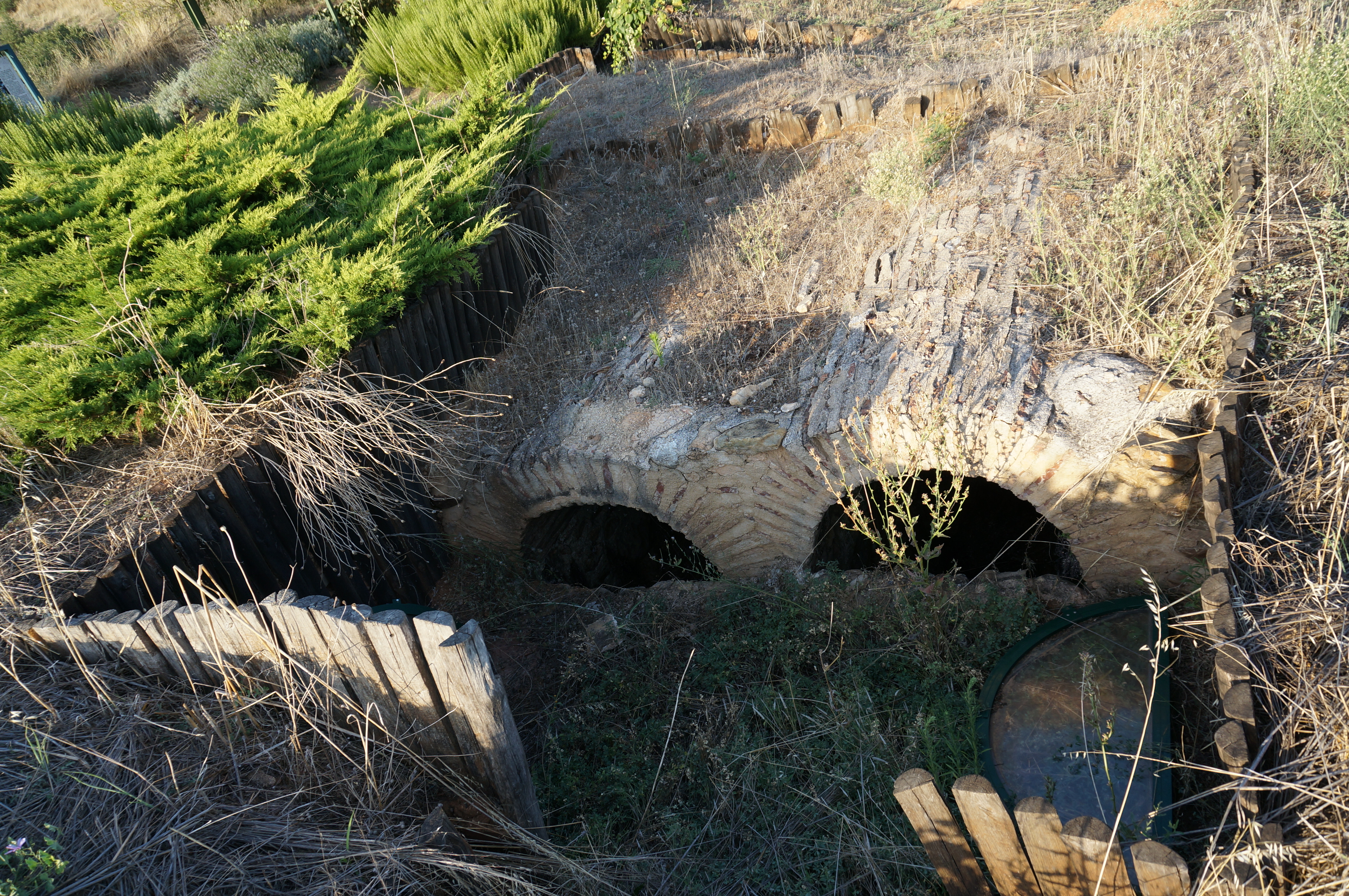 une tombe Romaine_avec double_chambre.